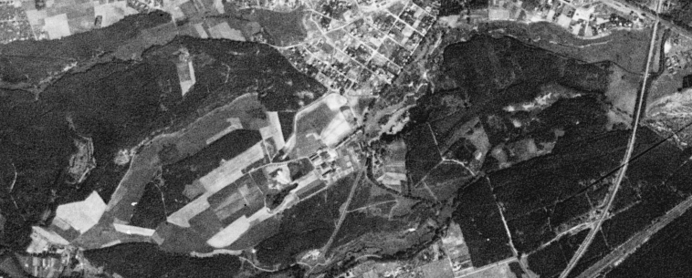 Tereny dzisiejszego poznańskiego Nowego Zoo i Antoninka sfotografowane przez amerykańskiego satelitę wywiadowczego KH-4A 1023, 23 sierpnia 1965 r. Rozległe łąki na lewo od środka zdjęcia to tereny przyszłego Nowego Zoo i stawów. Wyraźnie widoczny jest również Fort III Twierdzy Poznań. Na prawo od środka tereny przyszłych ogrodów działkowych "Nowy Młyn". Poniżej ich, przyszły Staw Browarny. Na prawo, Młyński Staw. Oba powstaną na skutek spiętrzenia Cybiny. U góry, Antoninek. Skrajnie po prawej widoczny łuk linii kolejowej i fragment dzisiejszej DK92 Poznań-Warszawa.